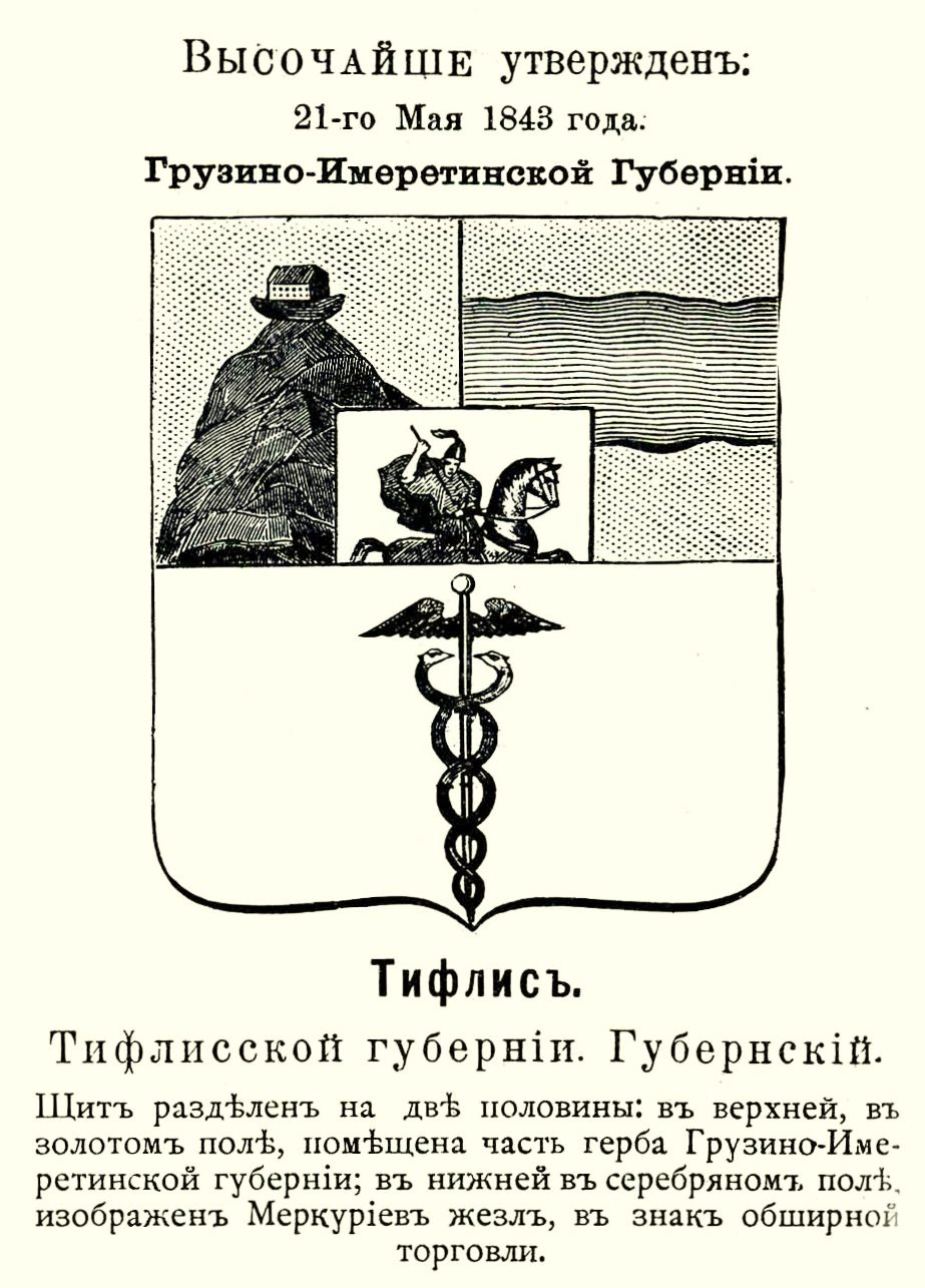 Official Russian Empire coat of arms Tiflis. Герб Российской Империи губернского города Тифлис Тифлисской губернии (в 1843 - Грузино-Имеретинской губернии) с официальным описанием в Гербовнике Винклера.